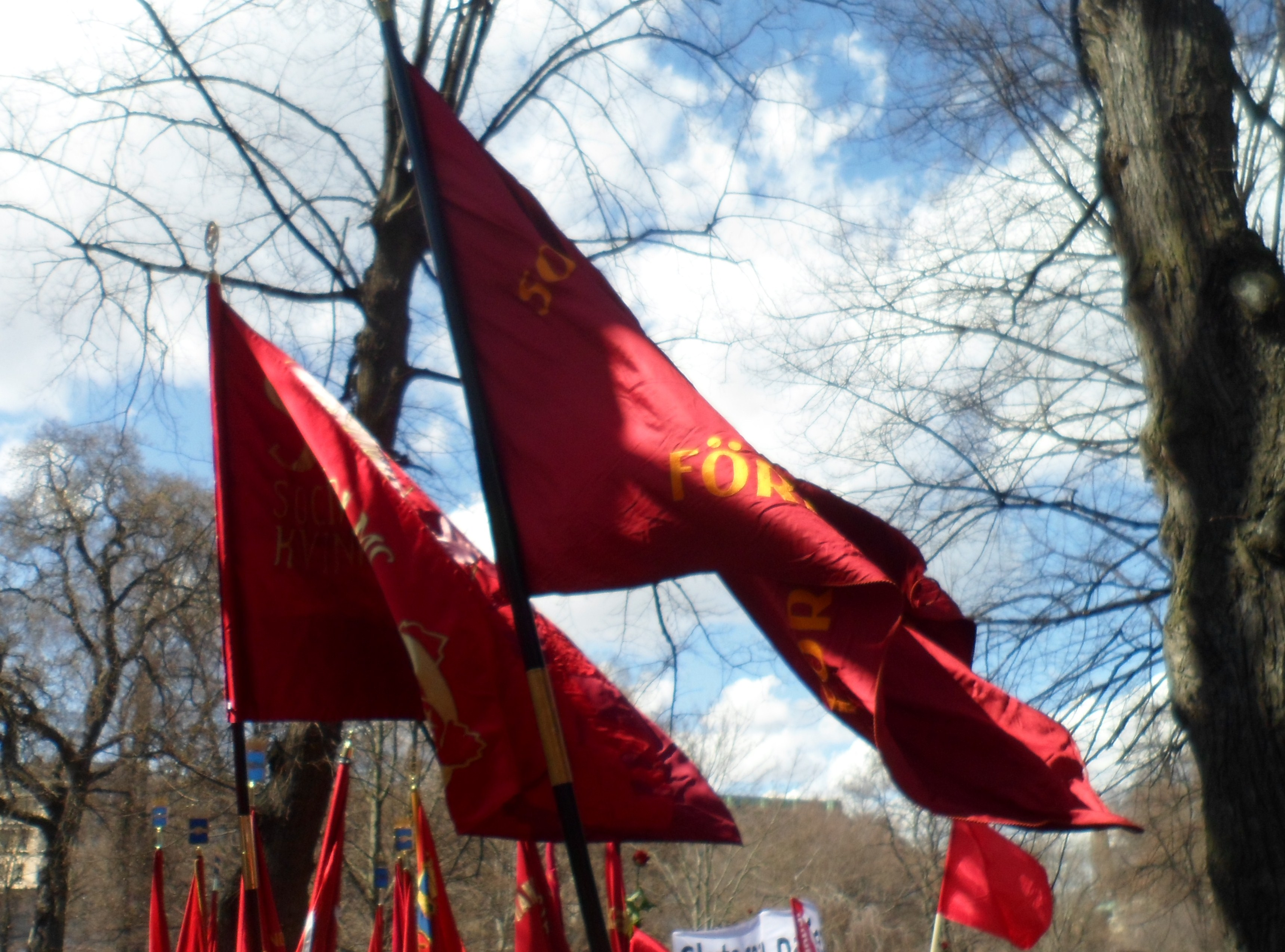 (S)amling I Humlegården